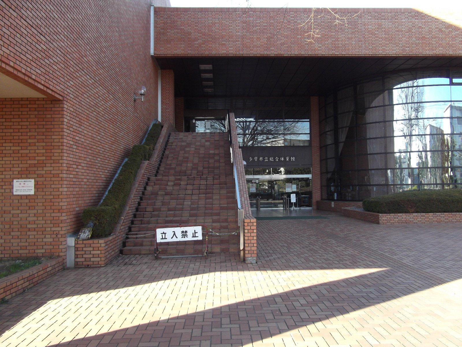 多摩市立総合体育館